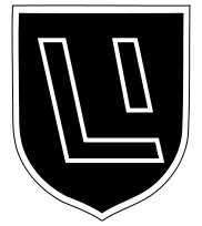 Emblema.